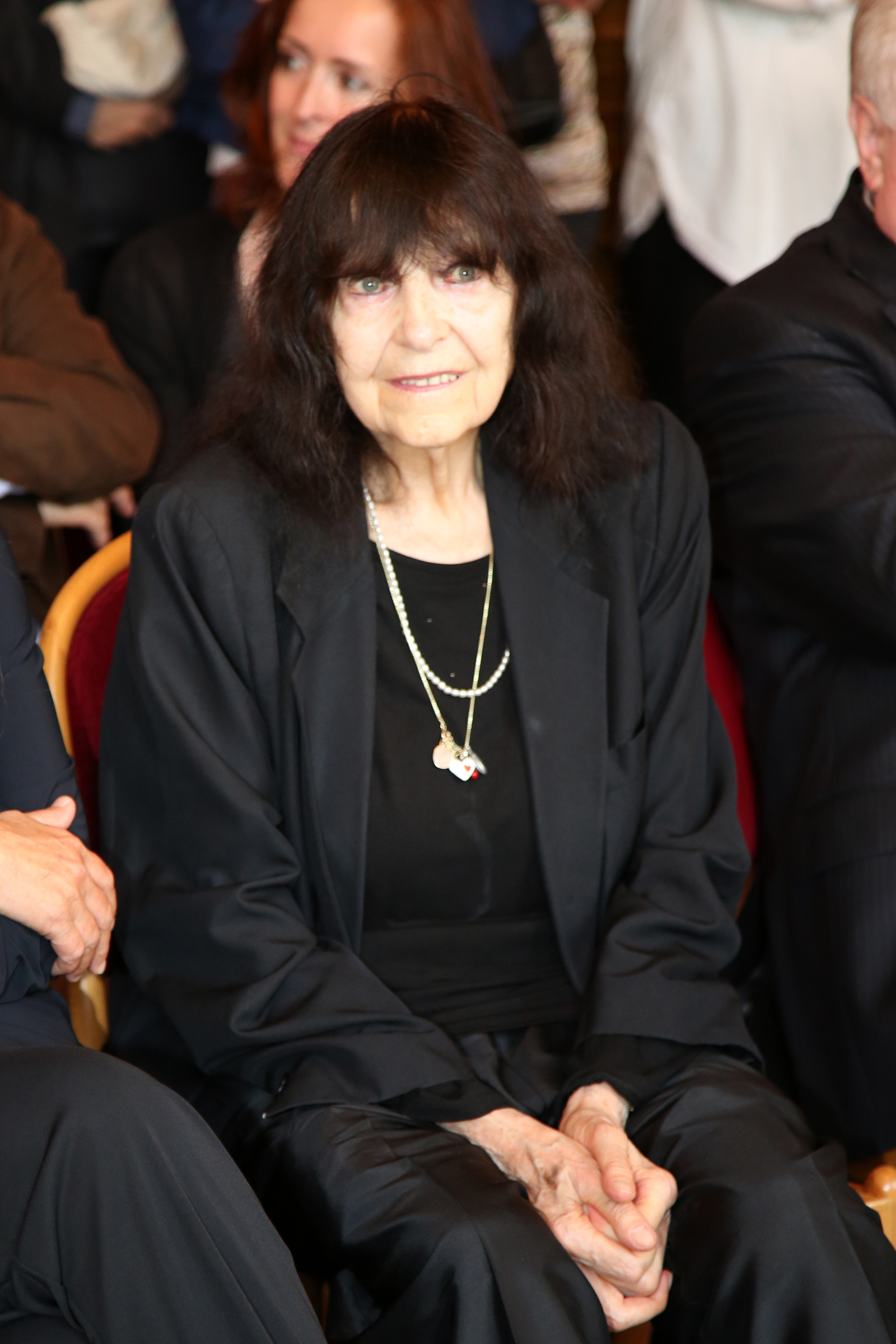 Mayröcker_Friederike-5784